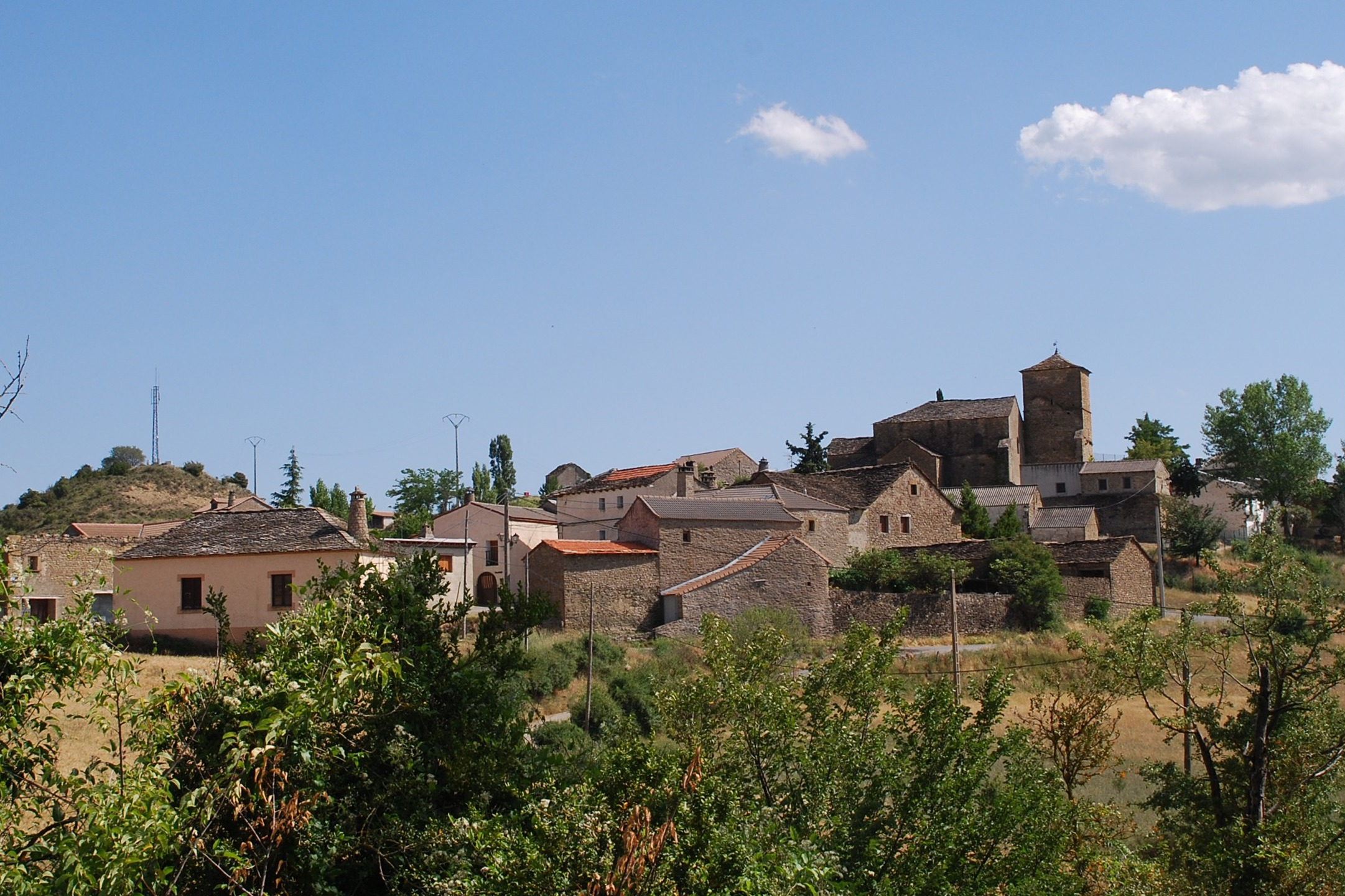 Bernués, localidad de Jaca (Aragón, España)